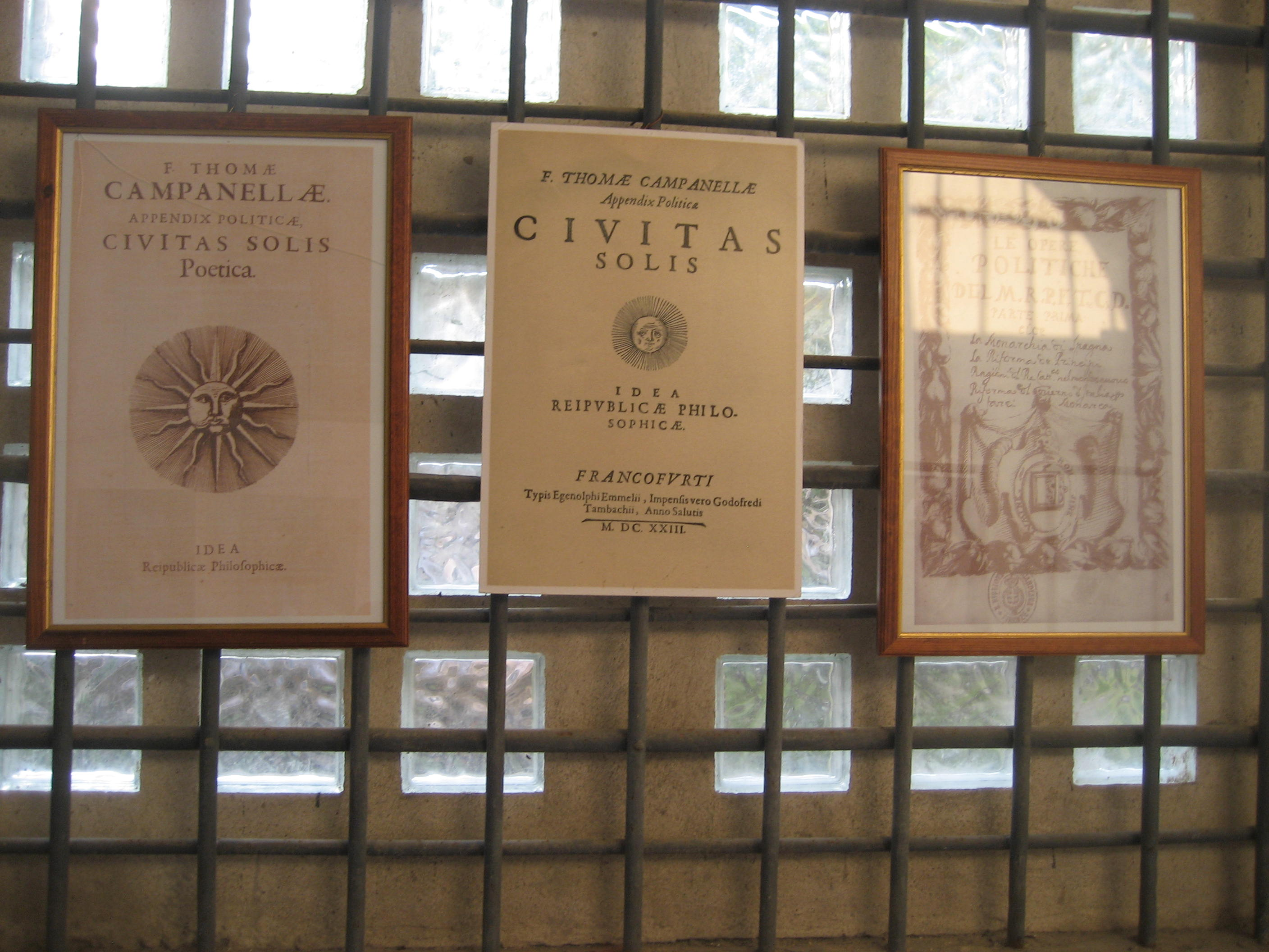 Civitas_Soli